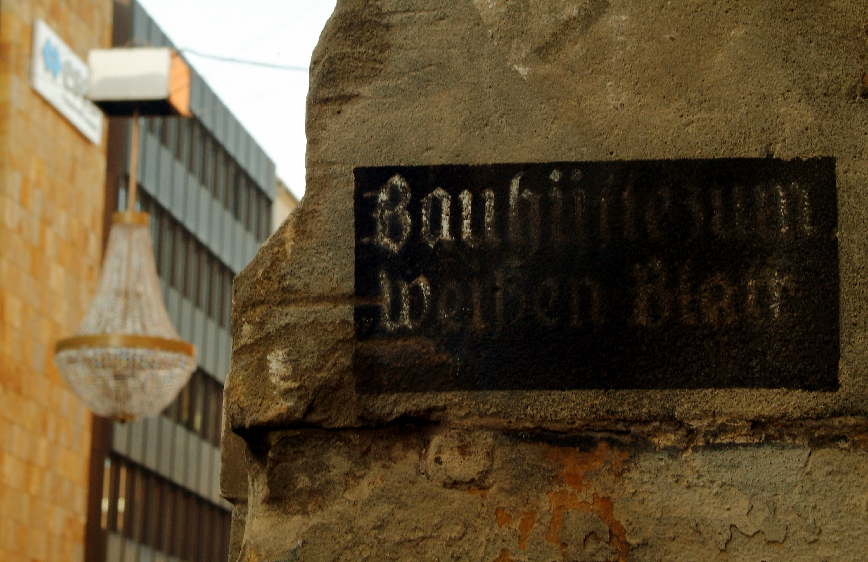 Schablonenschriftzug ("Stencil") Bauhütte zum weißen Blatt an der rechten Seite vom Künstlerhaus Hannover